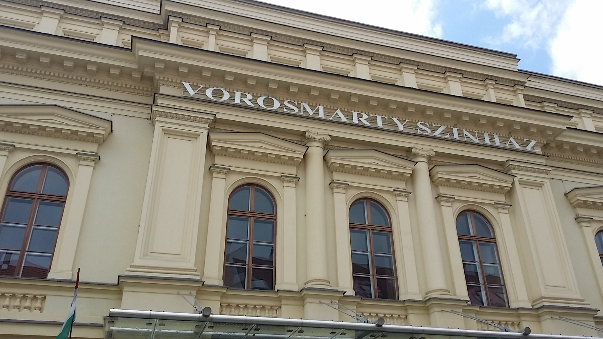 Székesfehérvár Vörösmarty Színház